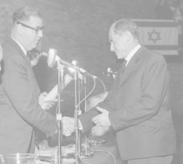 יוסף בנטואיץ'מקבל פרס ישראל 1962 צלם יהודה איזנשטרק גנזך המדינה